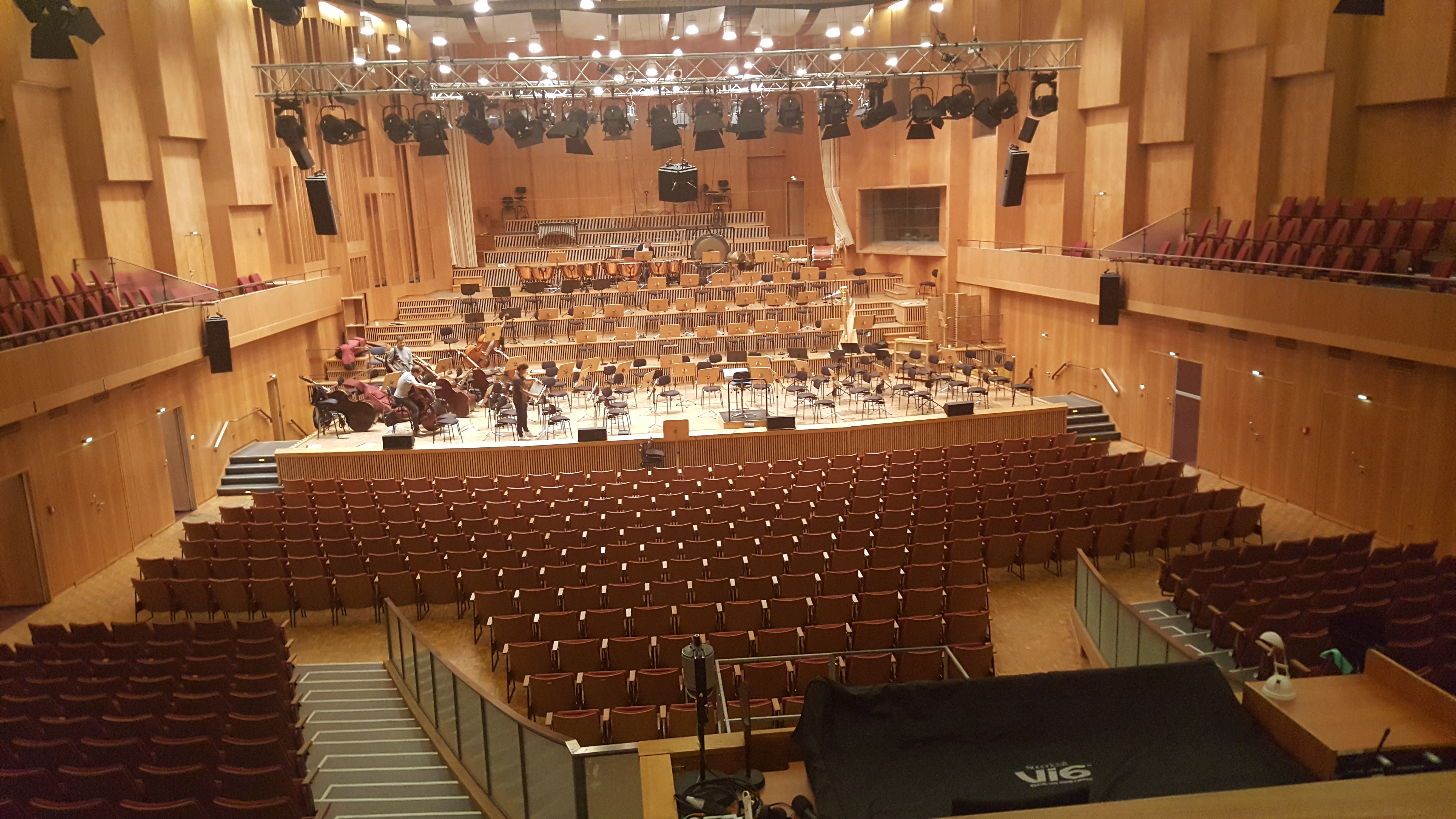 Die Bühne und Zuschauerränge im Großen Sendesaal (2019)